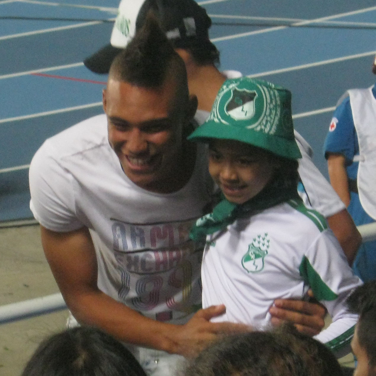 Encuentro entre el Glorioso Deportivo Cali y Patriotas Boyacá. El jugador Brayan "Coco" Perea en la tribuna.